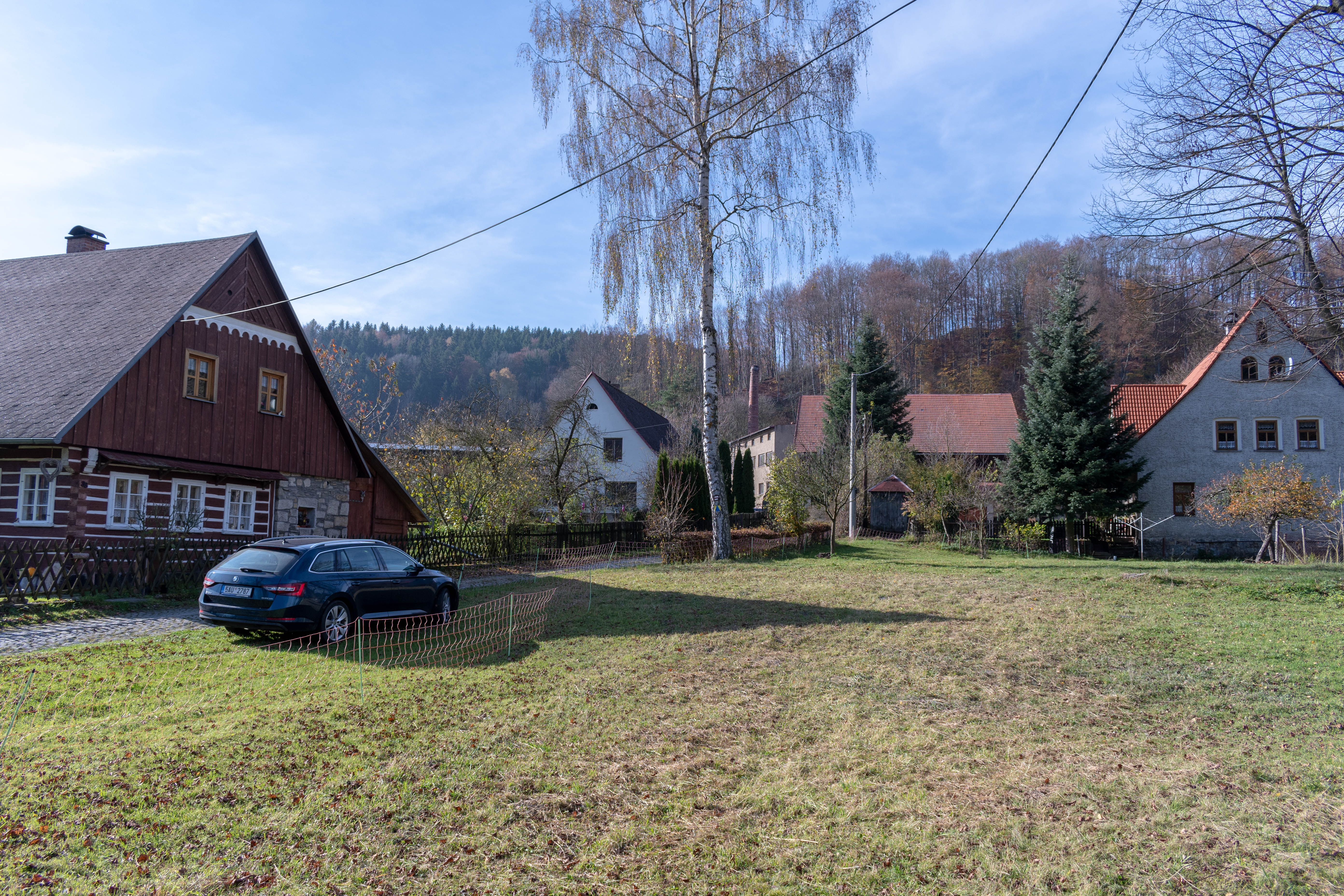 Celkový pohled na obec Javor